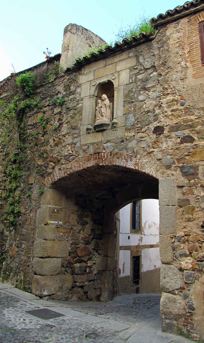 Arco de Santa Ana en la ciudad de Cáceres.